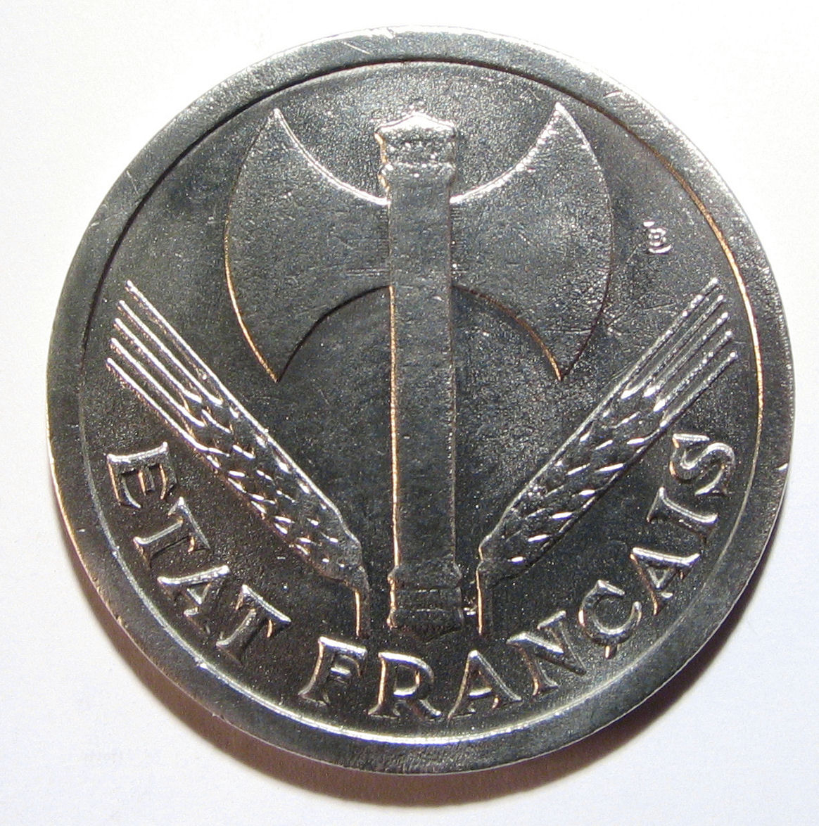 Pièce de deux francs 1943, État Français, régime de Vichy